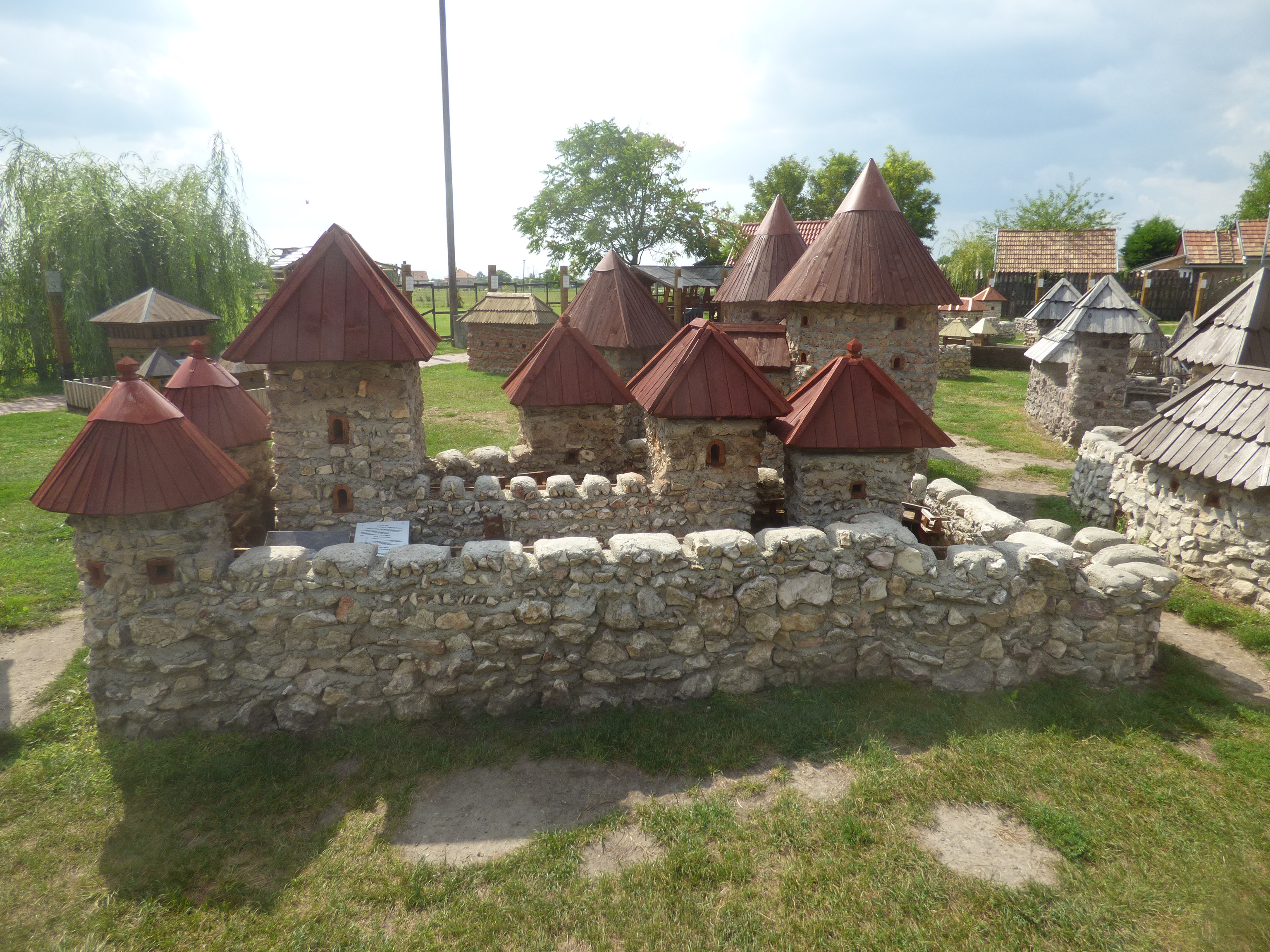 Drégely várának (Drégelypalánk) makettje a dinnyési Várparkban